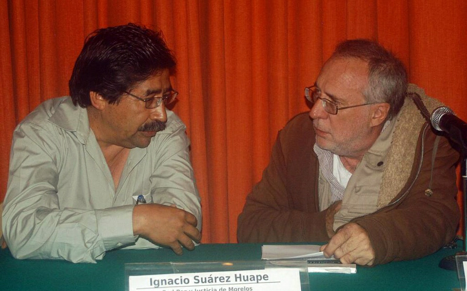 Juan Huape mantiene un diálogo con el poeta Javier Sicilia